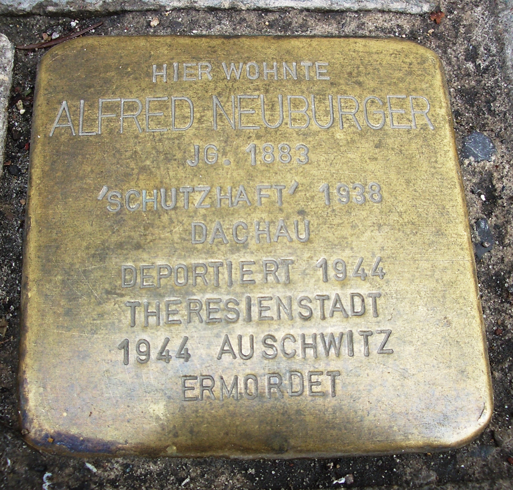 Der Stolperstein für Alfred Neuburger befindet sich in der Schützenstraße 38 in Neu-Ulm.